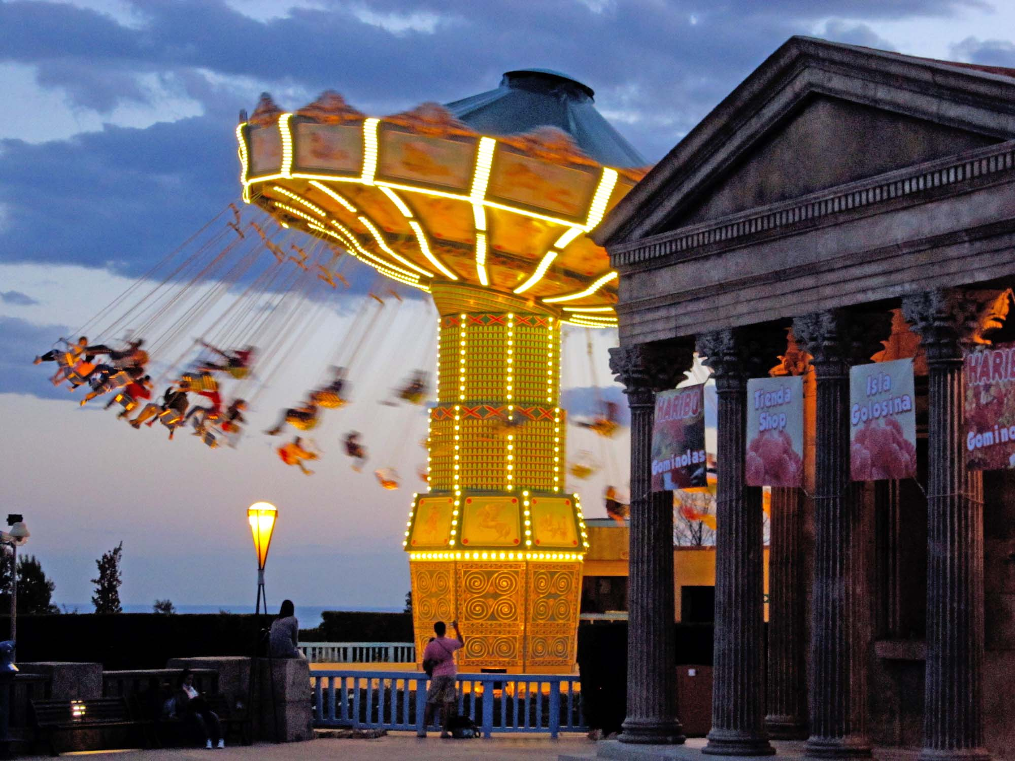 Imagen nocturna de la atracción Los Ícaros en la zona de Grecia de Terra Mítica